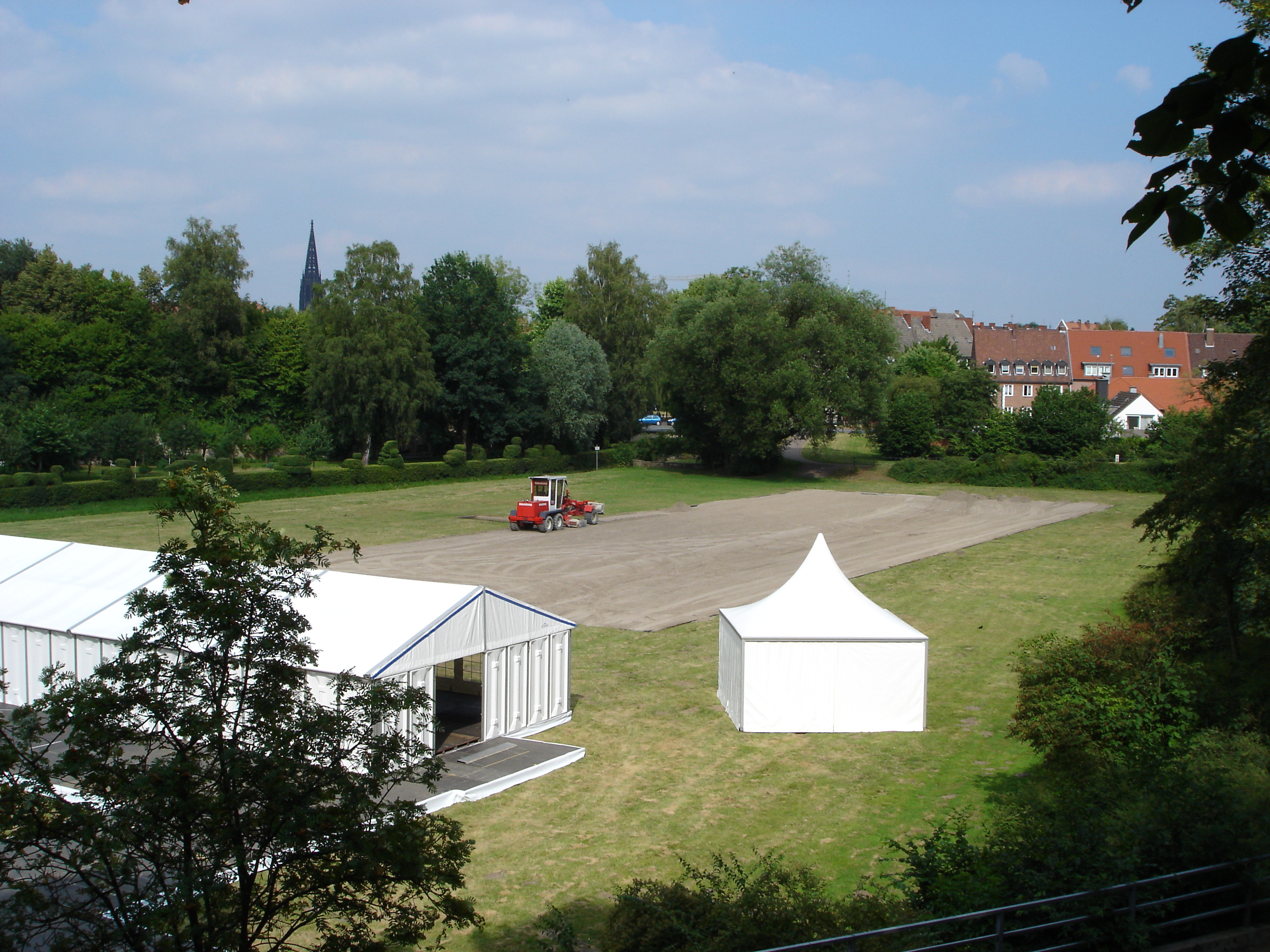 Vorbereitungen zum Turnier der Sieger auf der Westerholtschen Wiese in Münster, Westfalen, Germany